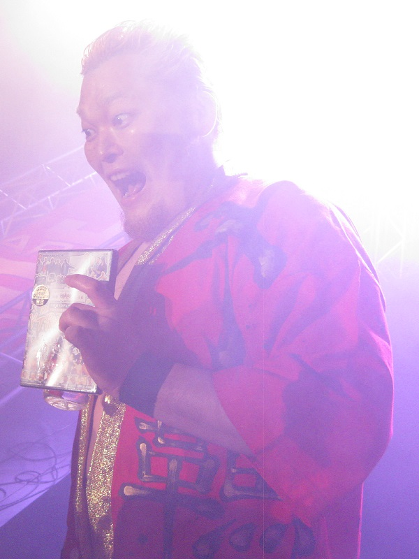 2014年6月21日 大阪府立体育会館 「DOMINION6.21」 矢野通